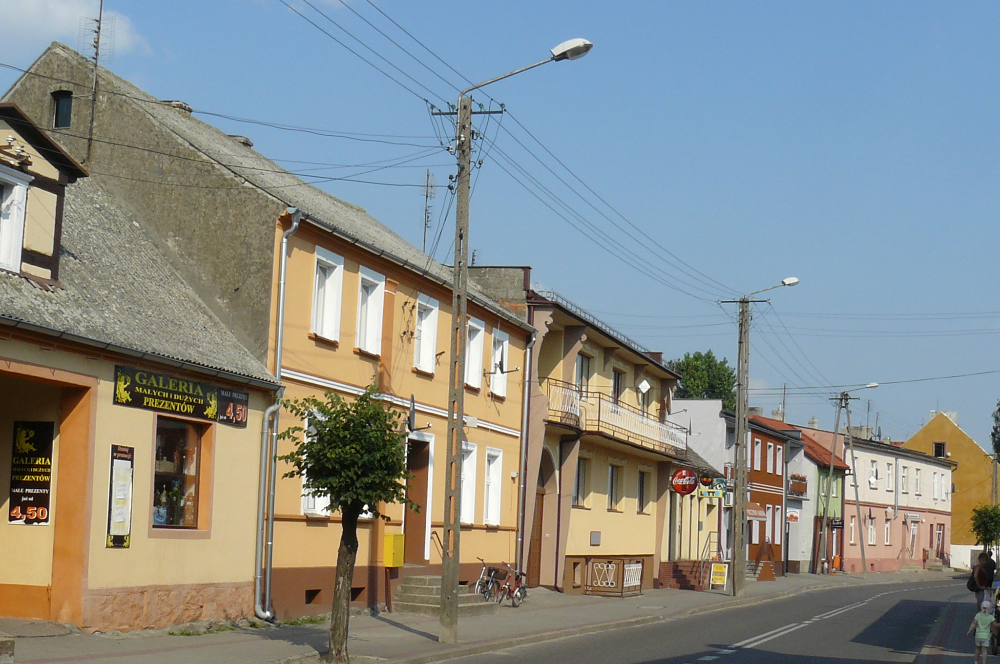 Wysoka.